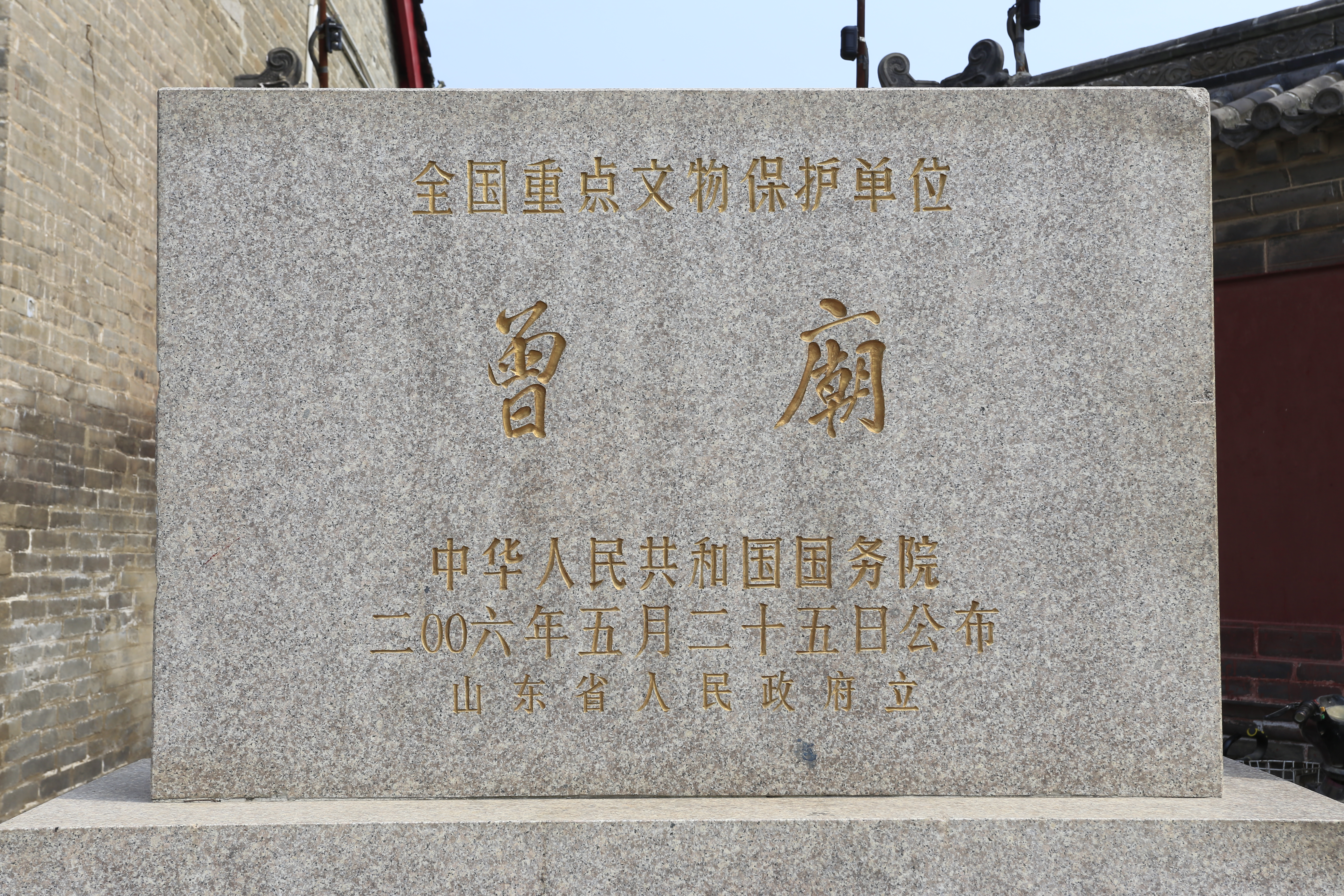 嘉祥曾庙—— 文保碑